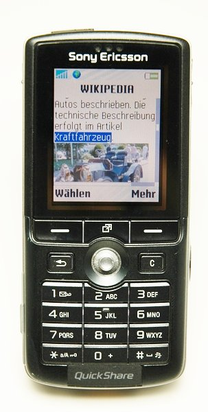 Bildbeschreibung: Sony Ericsson K750i Quelle: selbst fotografiert Fotograf/Zeichner: Heiko Riffeler Datum: andere Versionen